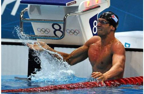 Olimpiadi di Atalanta